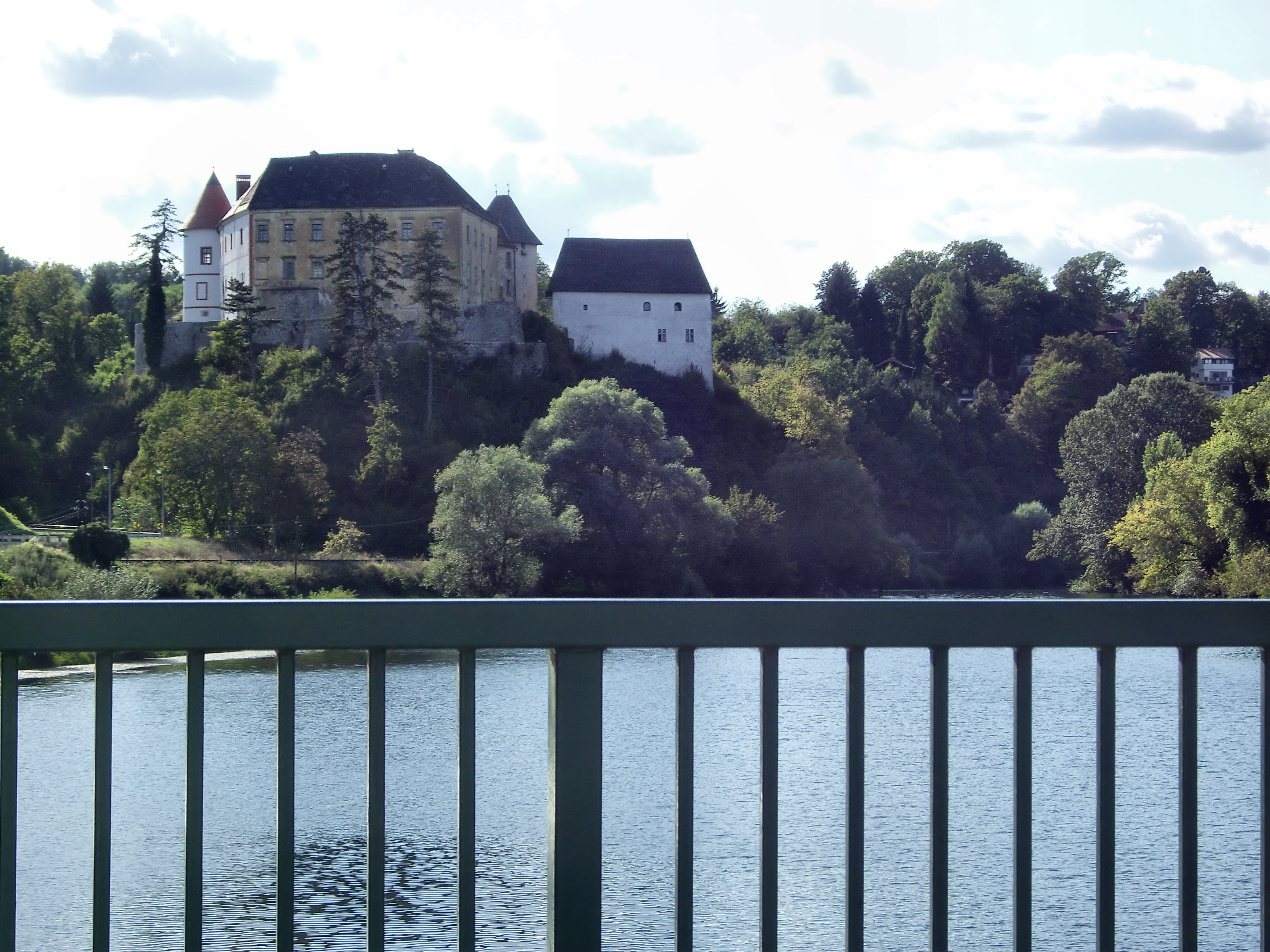 Ansicht der Burg Ozalj von der Staumauer